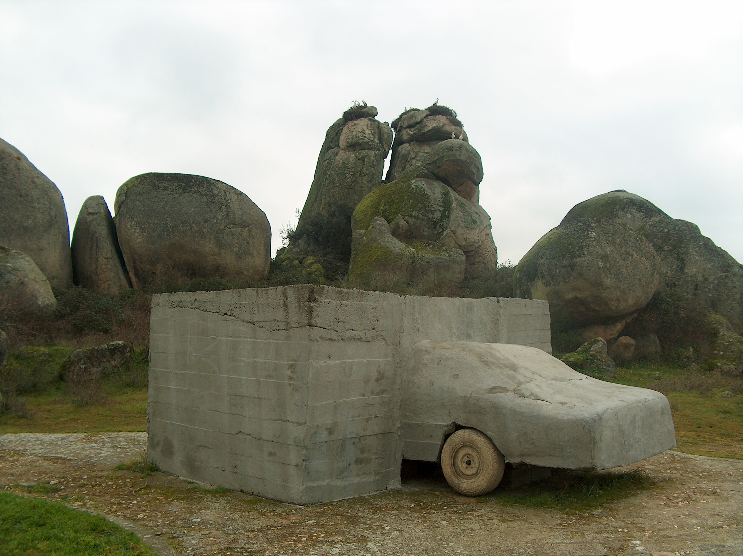 Obra de arte en el exterior del Museo Vostell de Malpartida de Cáceres.